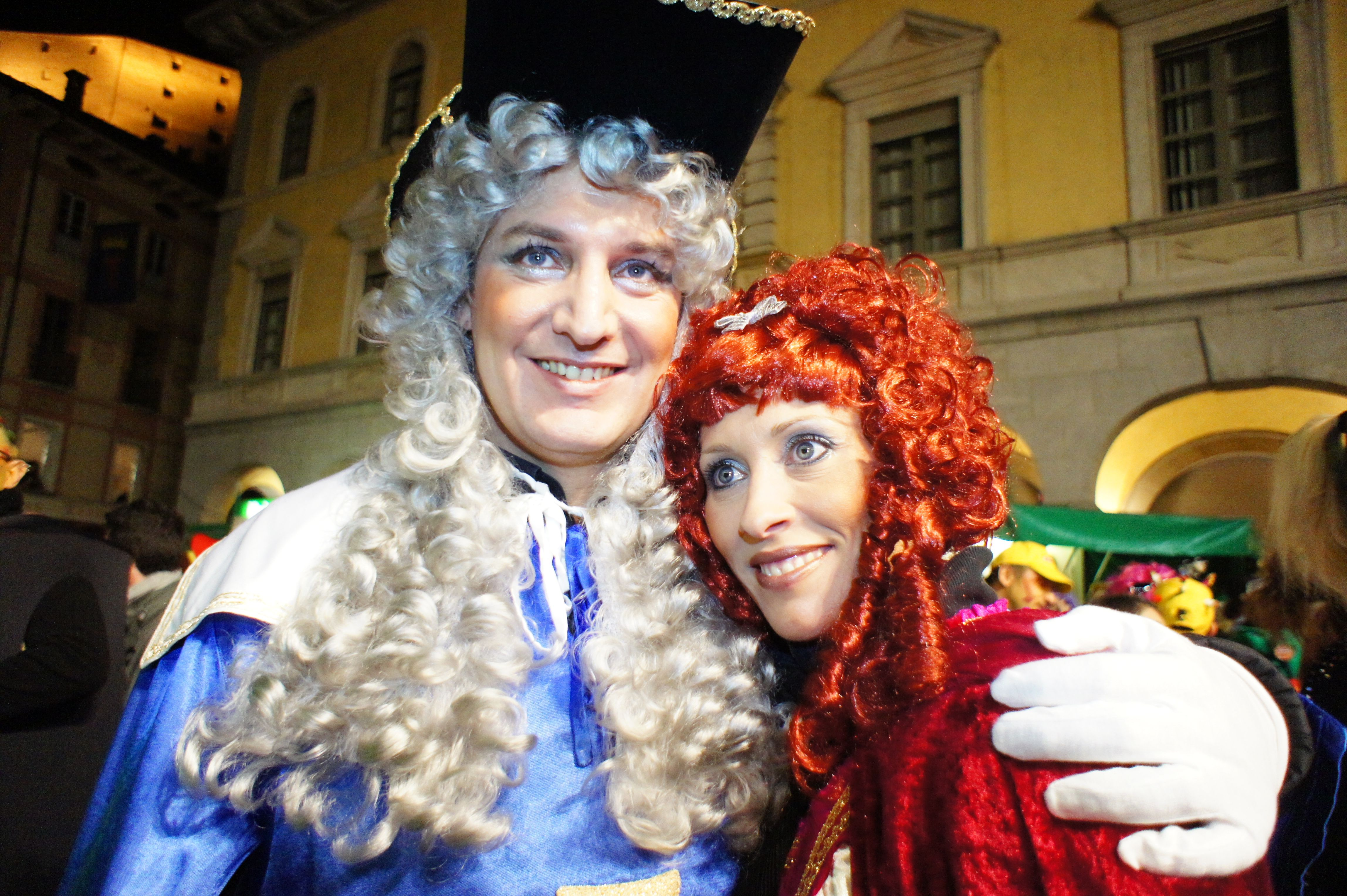 Carnevale Rabadan Bellinzona 2012